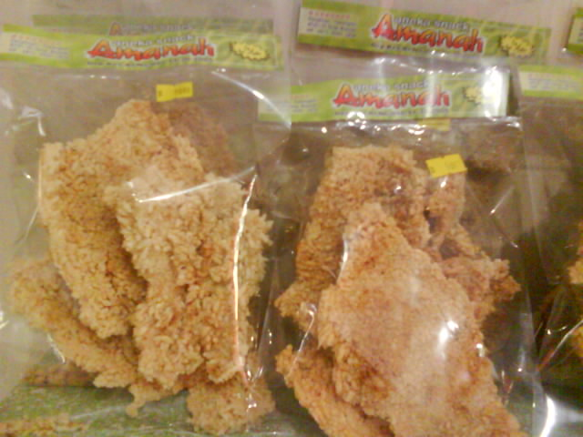 Makanan yang terbuat dari Nasi yang masih menempel di kwali/wajan